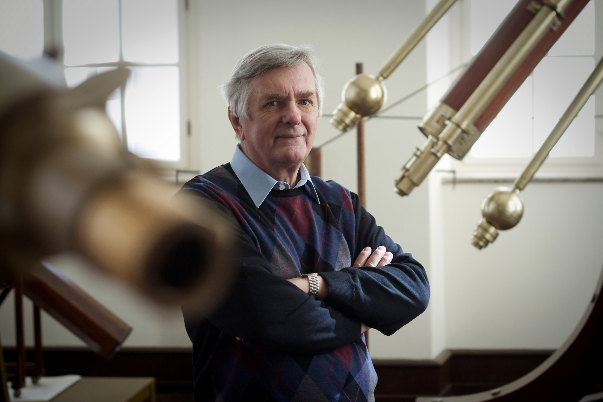 Astronoom Tõnu Viik Tartu Tähetornis.